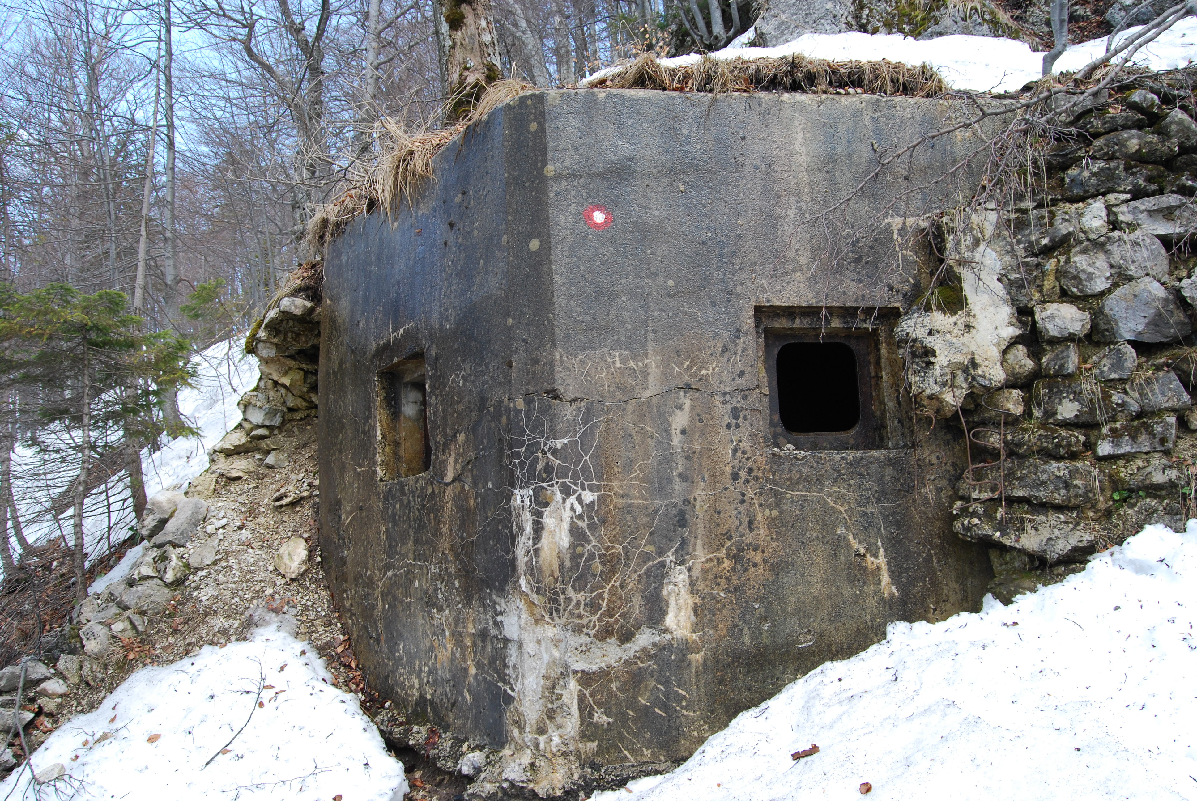 Lahki bunker pod vrhom Blegoša.